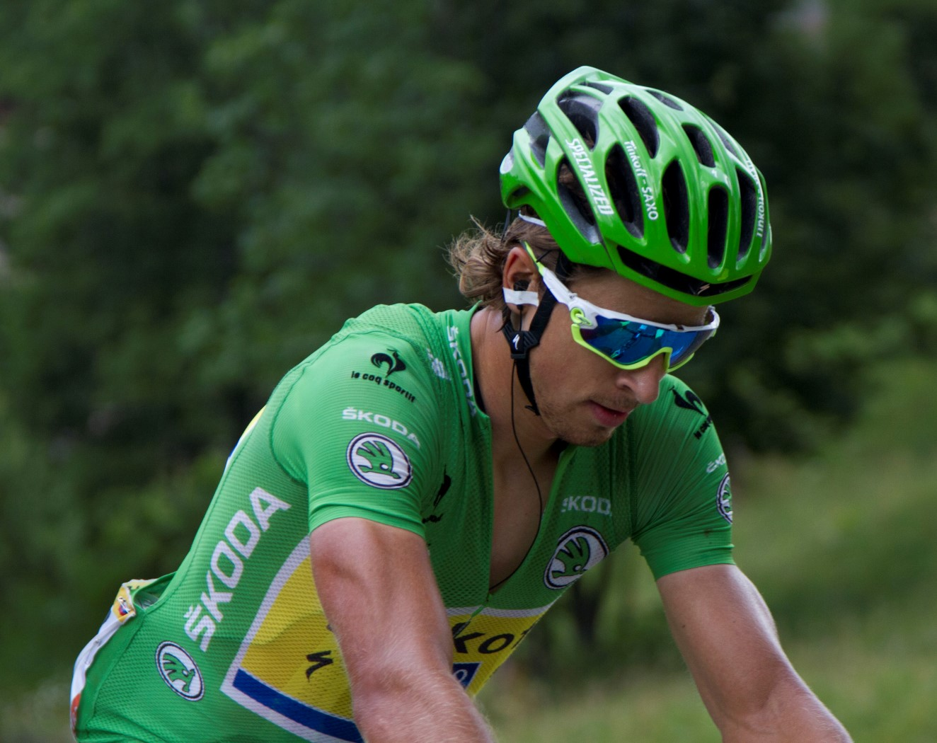 213 sagan